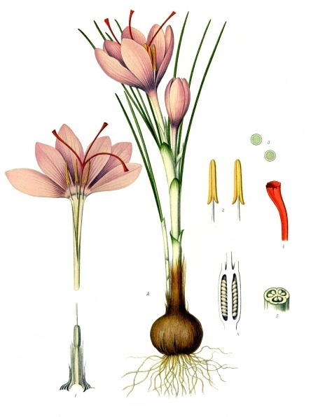 Safran. A Pflanze in natürl. Grösse; 1 dieselbe im Längsschnitt, desgl.; 2 Staubgefässe, vergrössert; 3 Pollen, desgl.; 4 Fruchtknoten im Längsschnitt, desgl.; 5 derselbe im Querschnitt; 6 Narbe, desgl.